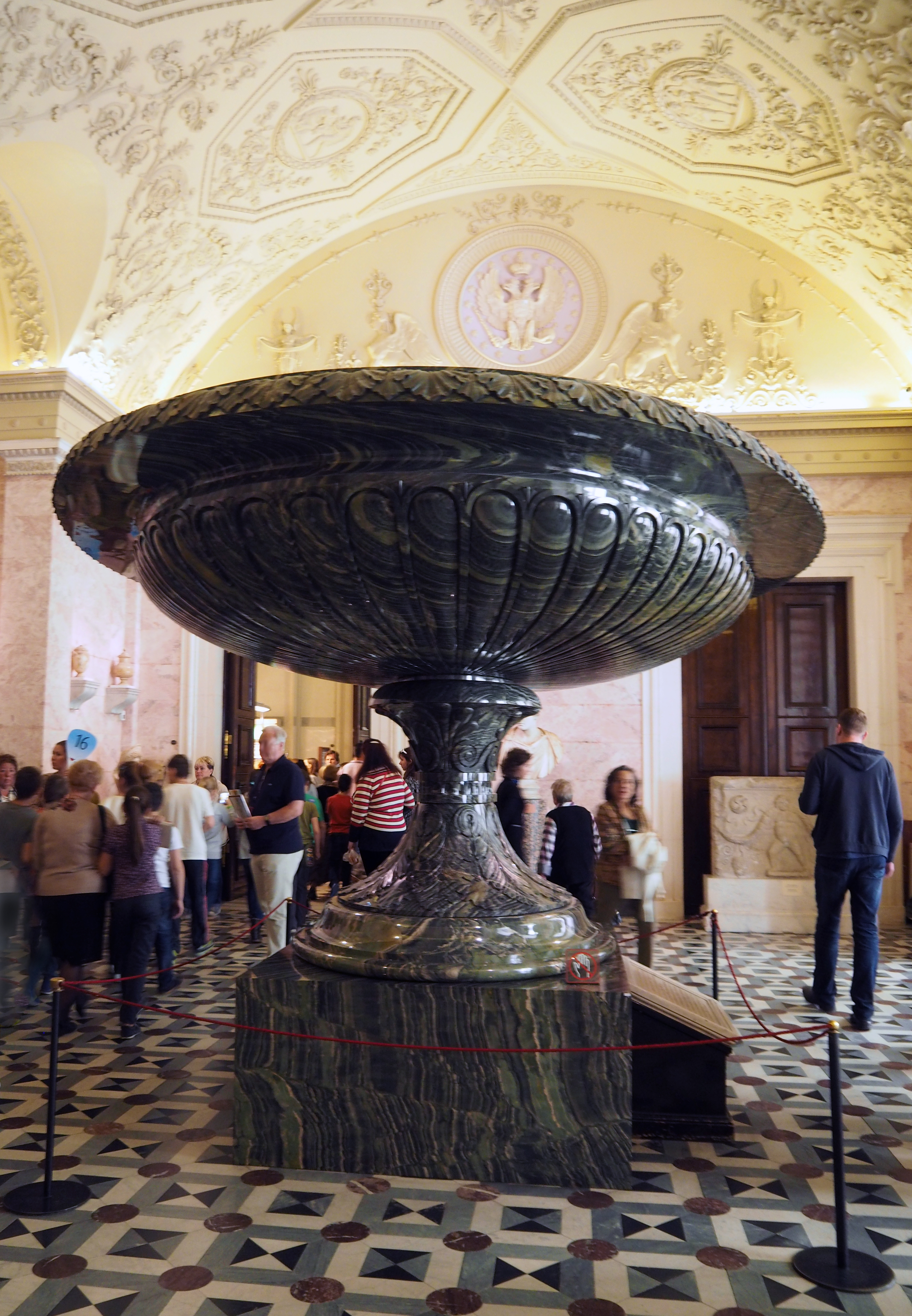 Revnev-Jaspis-Vase (5,04 × 3,22 Meter) in der Eremitage, St. Petersburg (Im Raum aus rosa Marmor mit weißen Carrara-Marmor Säulen), gefertigt Anfang des 19. Jahrhunderts in der Steinschleiferei Kolywan